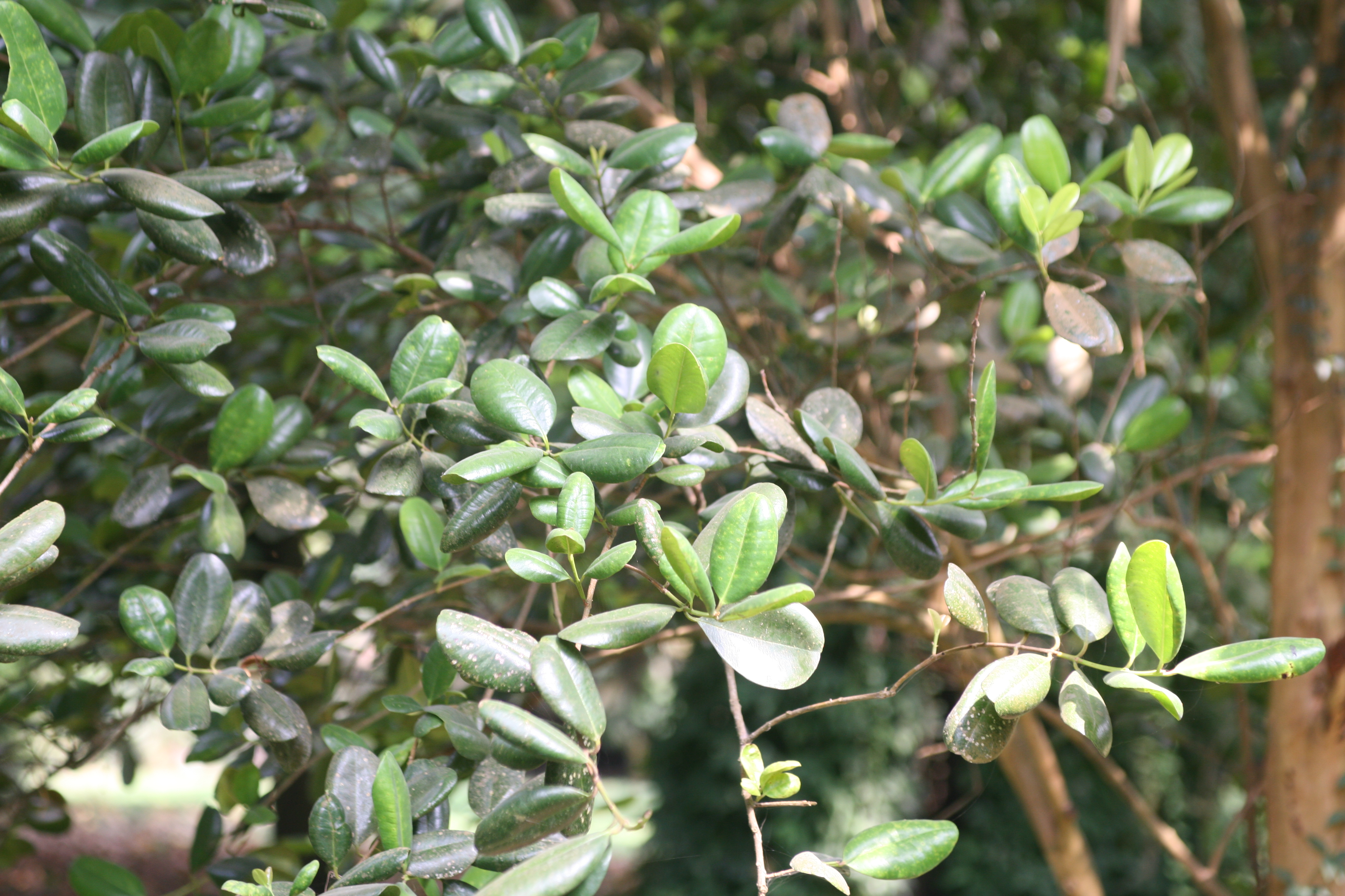 Pimenta Racemosa - Jardin Botanique Limbé Cameroun